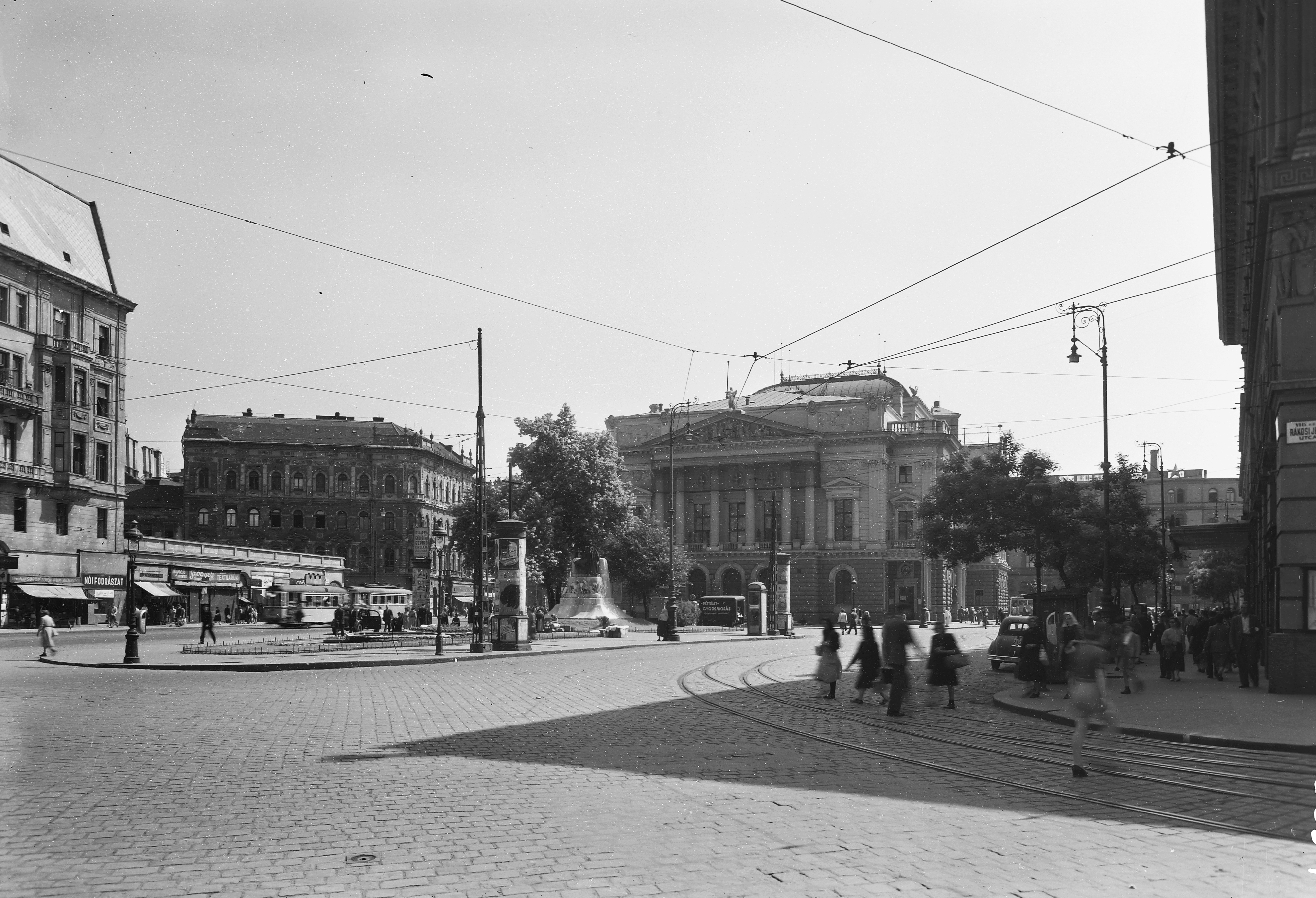 Blaha Lujza tér a Márkus Emilia (Rákosi Jenő) utcától nézve. Szemben a Nemzeti Színház, előtte a Tinódi szobor, jobbra a Corvin áruház. Location: Hungary, Budapest VIII. Tags: street furniture, lamp post, Budapest Title: Blaha Lujza tér a Márkus Emilia (Rákosi Jenő) utcától nézve. Szemben a Nemzeti Színház, előtte a Tinódi szobor, jobbra a Corvin áruház.